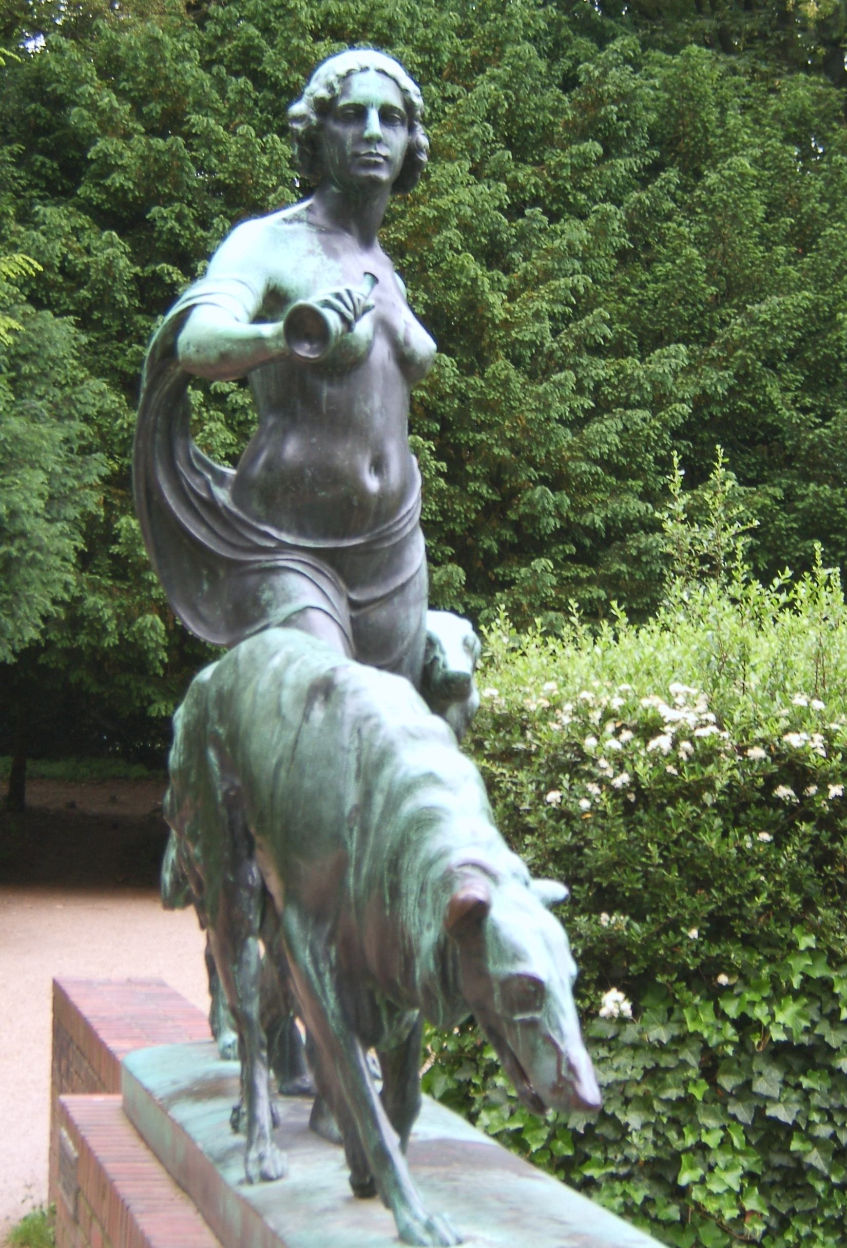 Bildbeschreibung: Hamburg, Winterhude, Stadtpark, Bildhauer: Arthur Bock Fotograf: selbst Datum: 14.6.2006